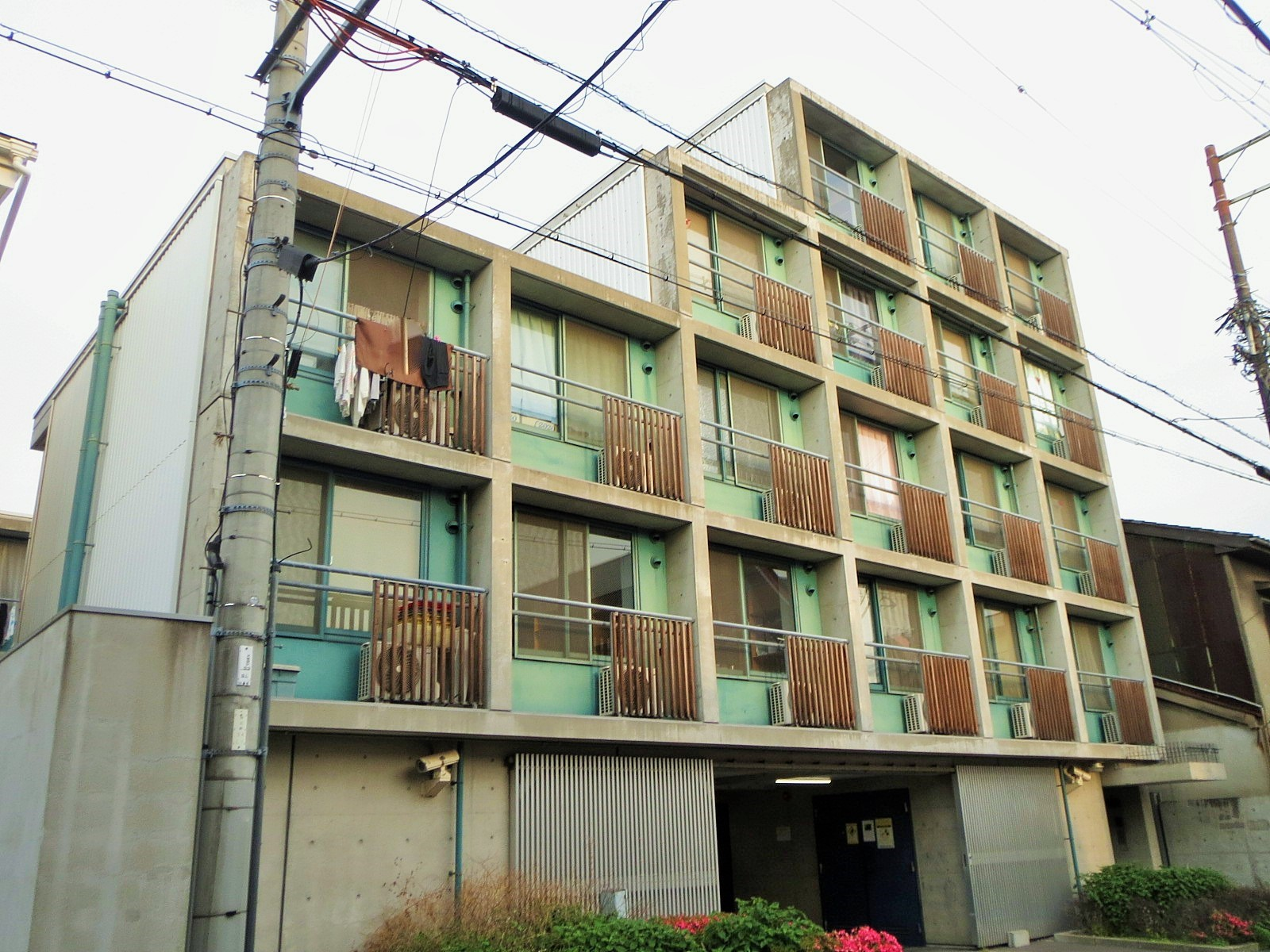 大阪まちなみ賞受賞 Canon IXY 3